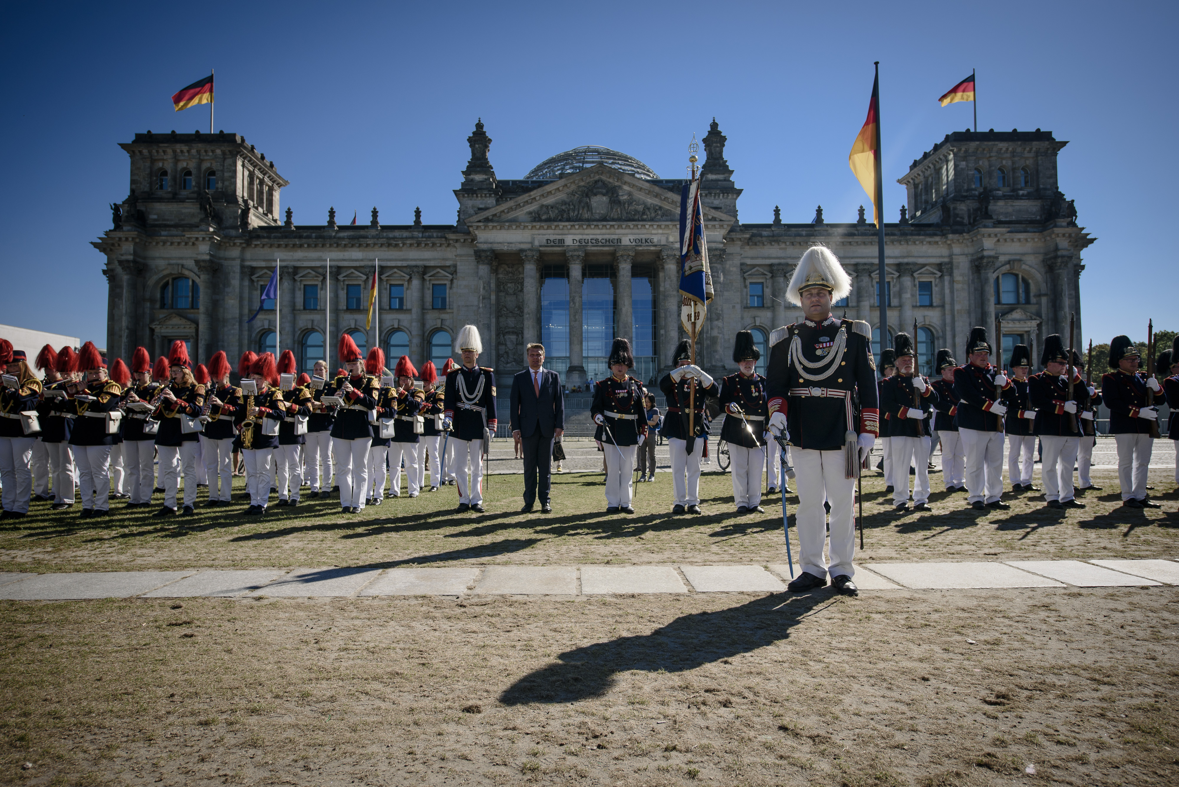 Bürgerwache Mengen am Freitag (26.08.16) in Berlin - 175 Jahre Deutschlandlied vor dem Reichstag